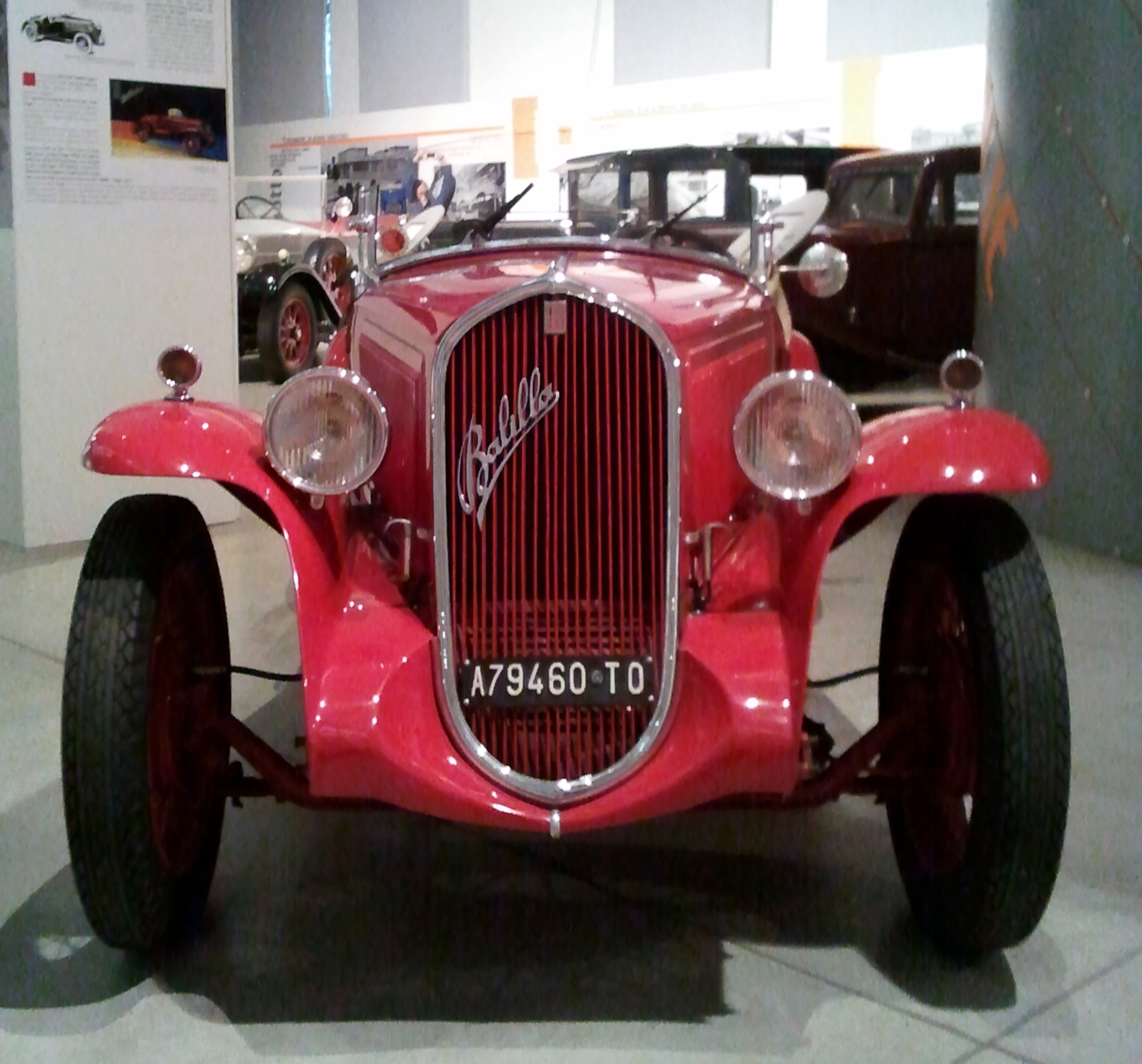 Fiat 508 "Ballilla" Coppa d'Oro en el Centro Storico Fiat